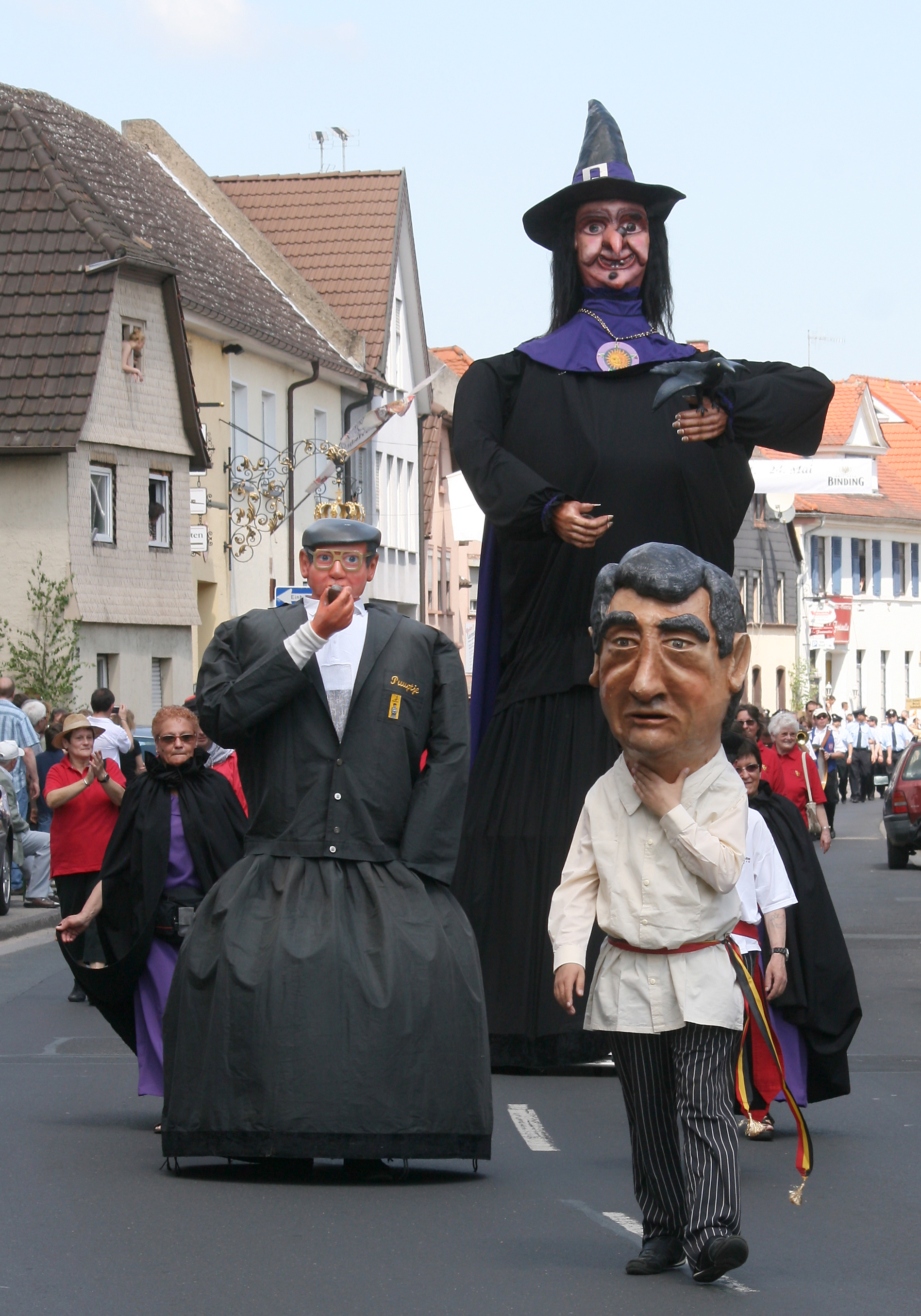 Riesen der Riesengilde Nieuwpoort (Belgien) während eines Festumzugs in der Partnerstadt Rodgau (Deutschland). Die größte Figur heißt Jacqueline (zur Erinnerung an Jacquemyne Puyt, die 1627 als Hexe verbrannt wurde), die mittlere heißt Puuptje (Julien Degroote, langjähriges Mitglied der Riesengilde), die kleine Figur heißt Crabbe und trägt die Gesichtszüge des Bürgermeisters von Nieuwpoort, Roland Crabbe.